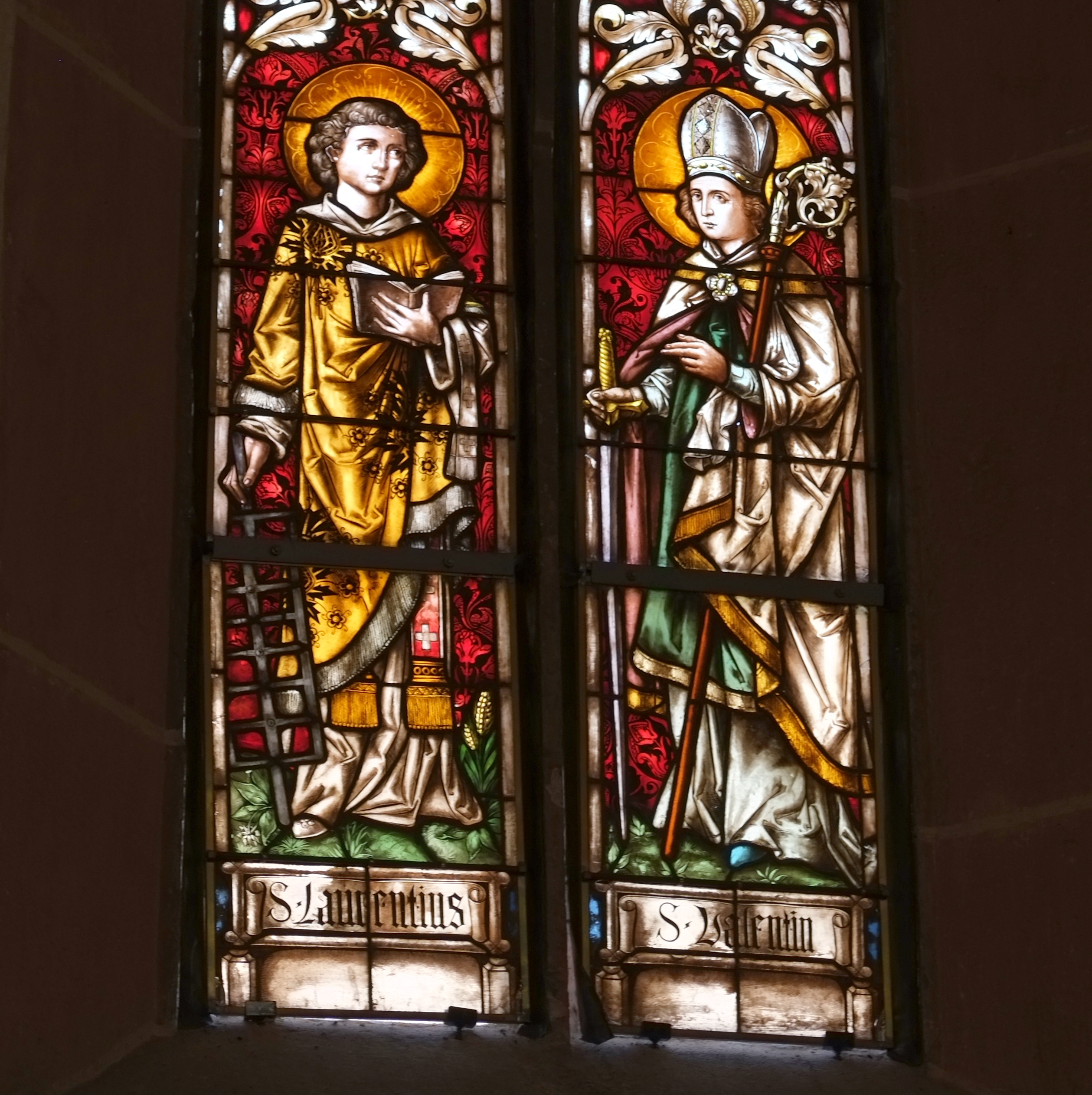 Bleiglasfenster in der Katharinenkapelle in Külsheim im Main-Tauber-Kreis (Baden-Württemberg, Deutschland)